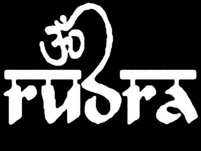 Logo der Band Rudra